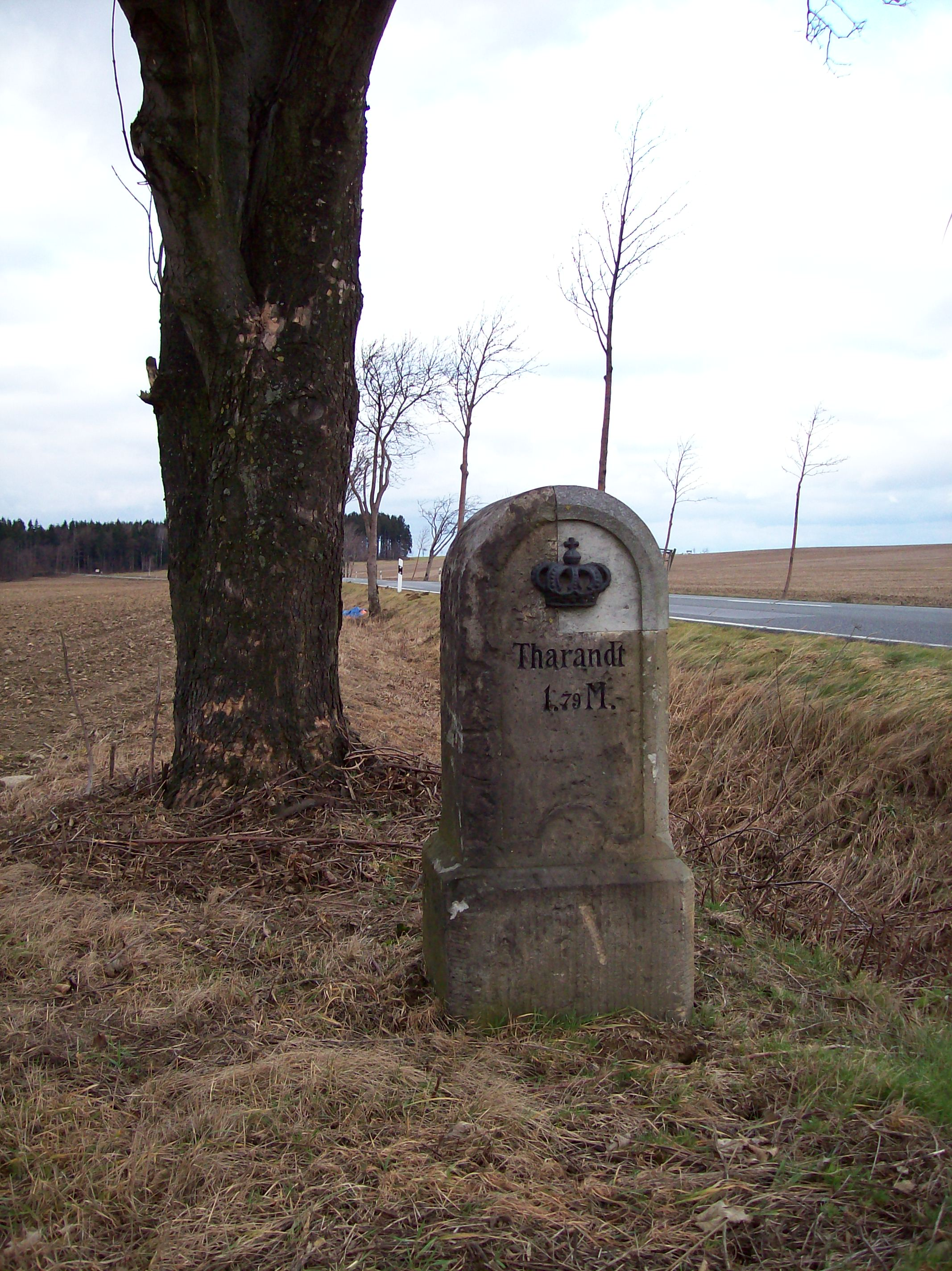 Königlich-sächischer Ganzmeilenstein an der Staatsstraße in Obercolmnitz